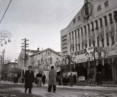 東宝直営第一映画劇場 - 盛岡市の「映画館通り」 昭和30年代